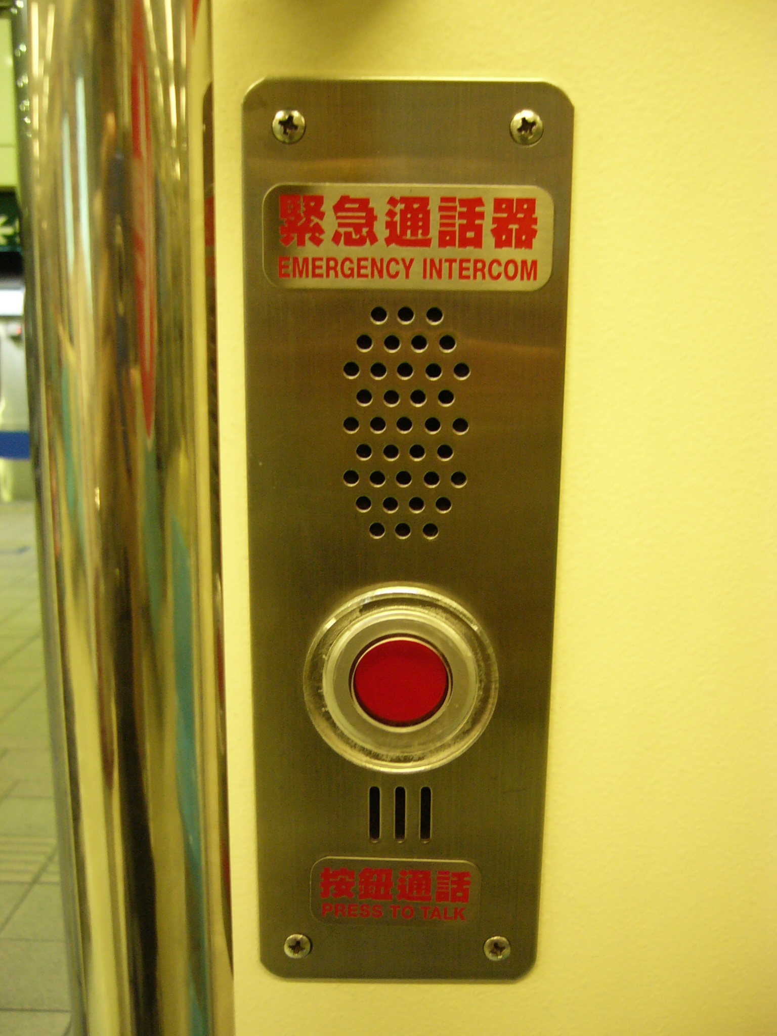 台北捷運371型電聯車3301車廂內的緊急通話器